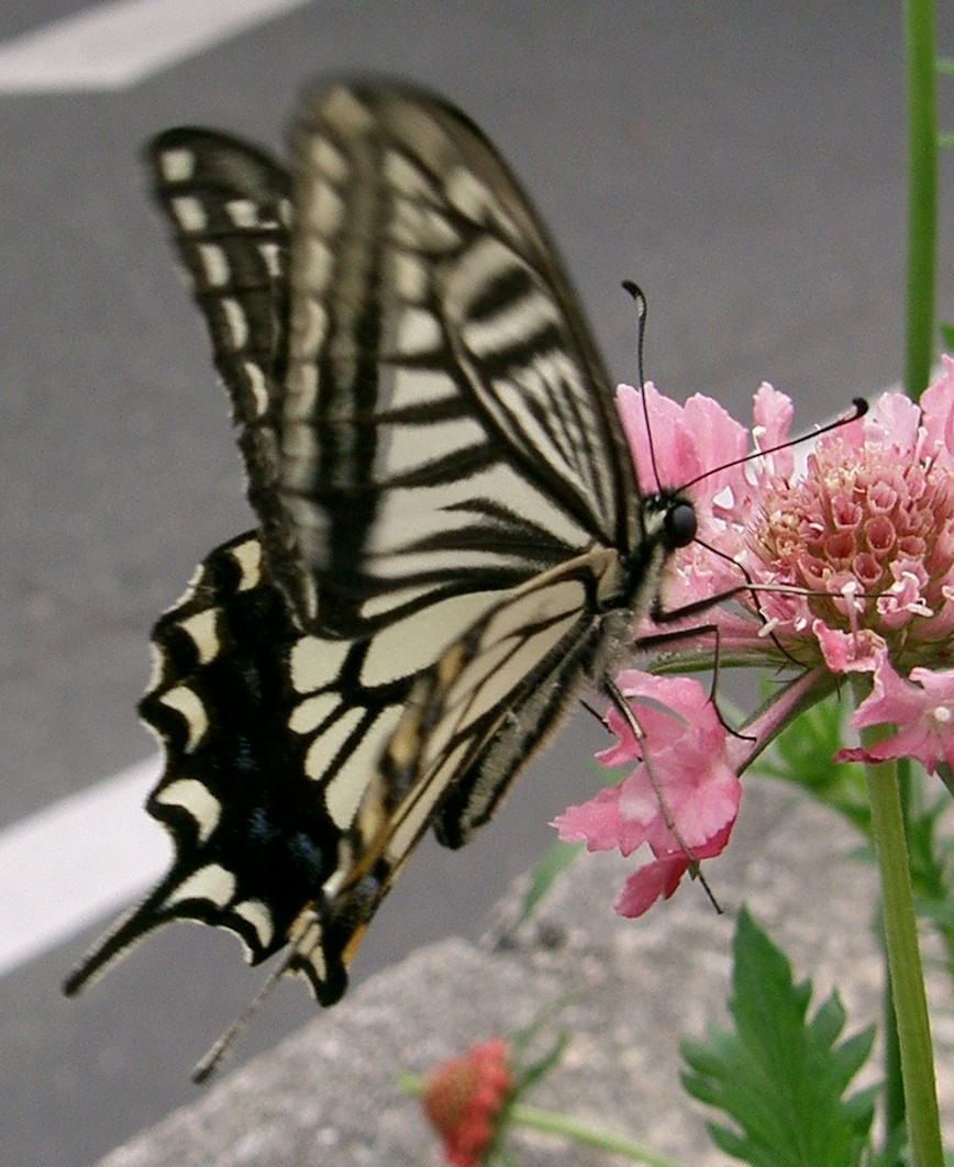 Papilio xuthus